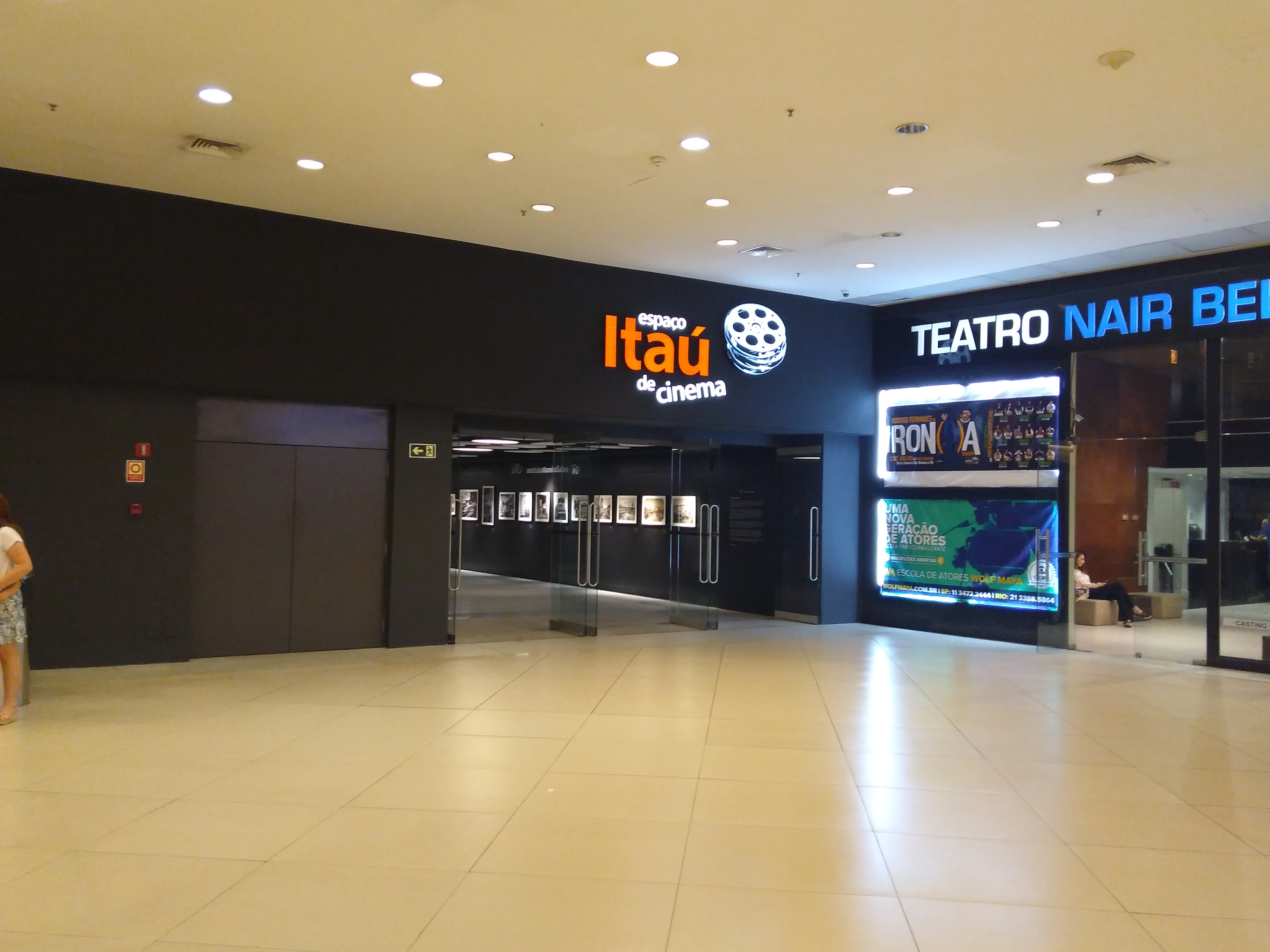 Área externa do Espaço Itaú de Cinema Frei Caneca de São Paulo, SP